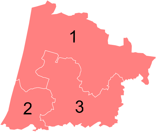 Résultats des élections législatives des Landes en 2012